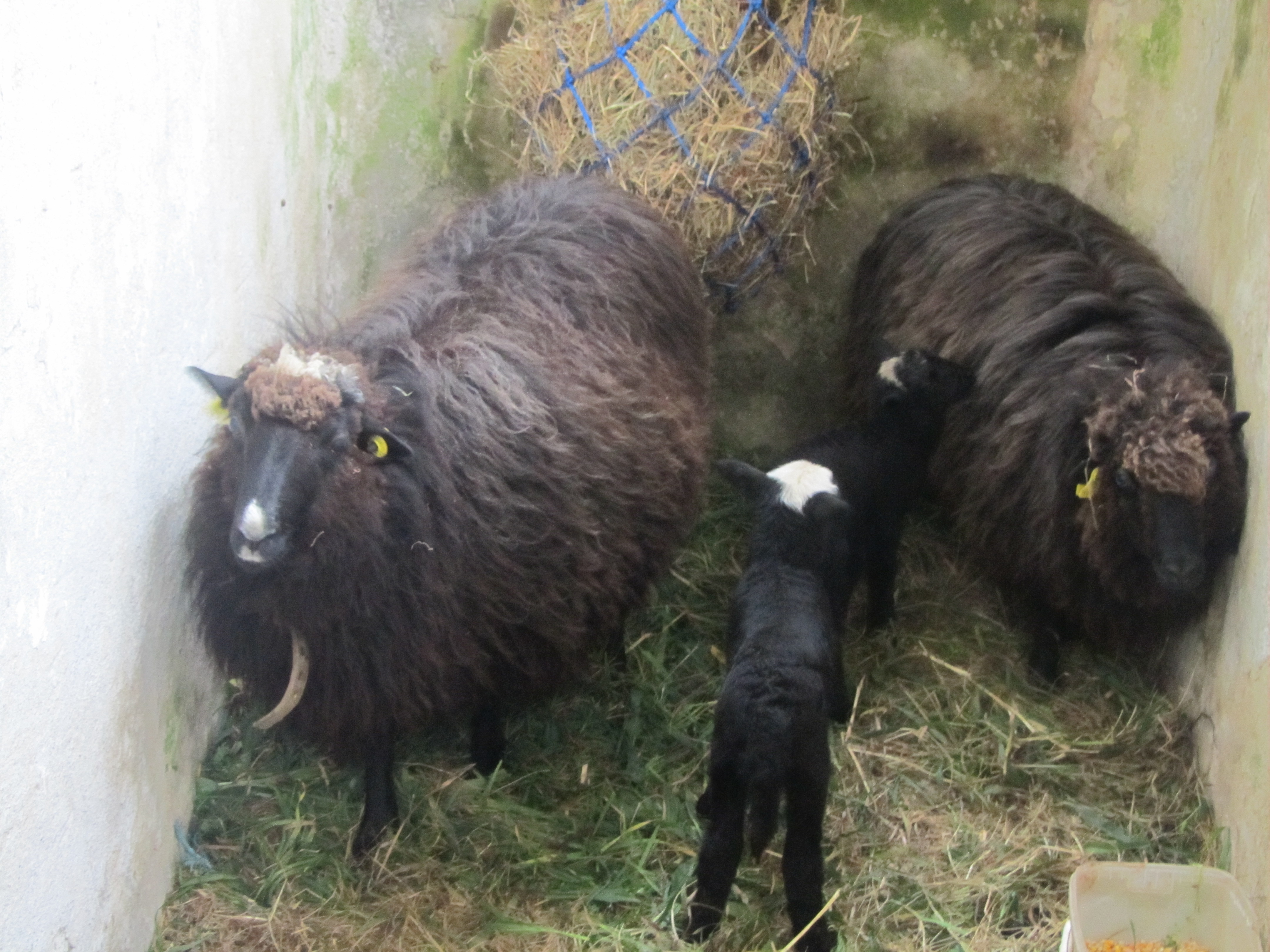 Ovejas Xaldas paridas, con estrella en la cabeza